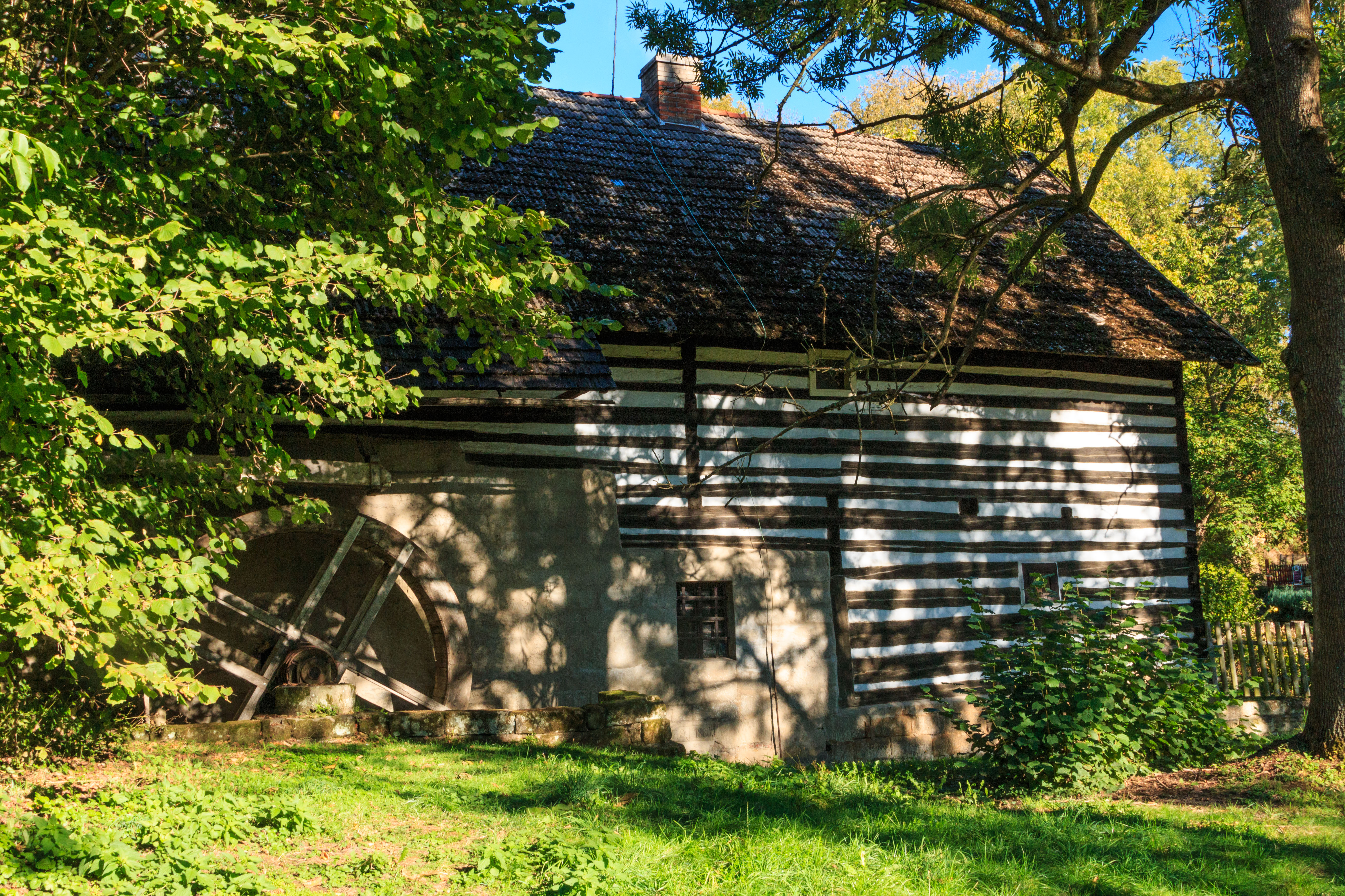 Střehomský mlýn Project: Vodstvo.